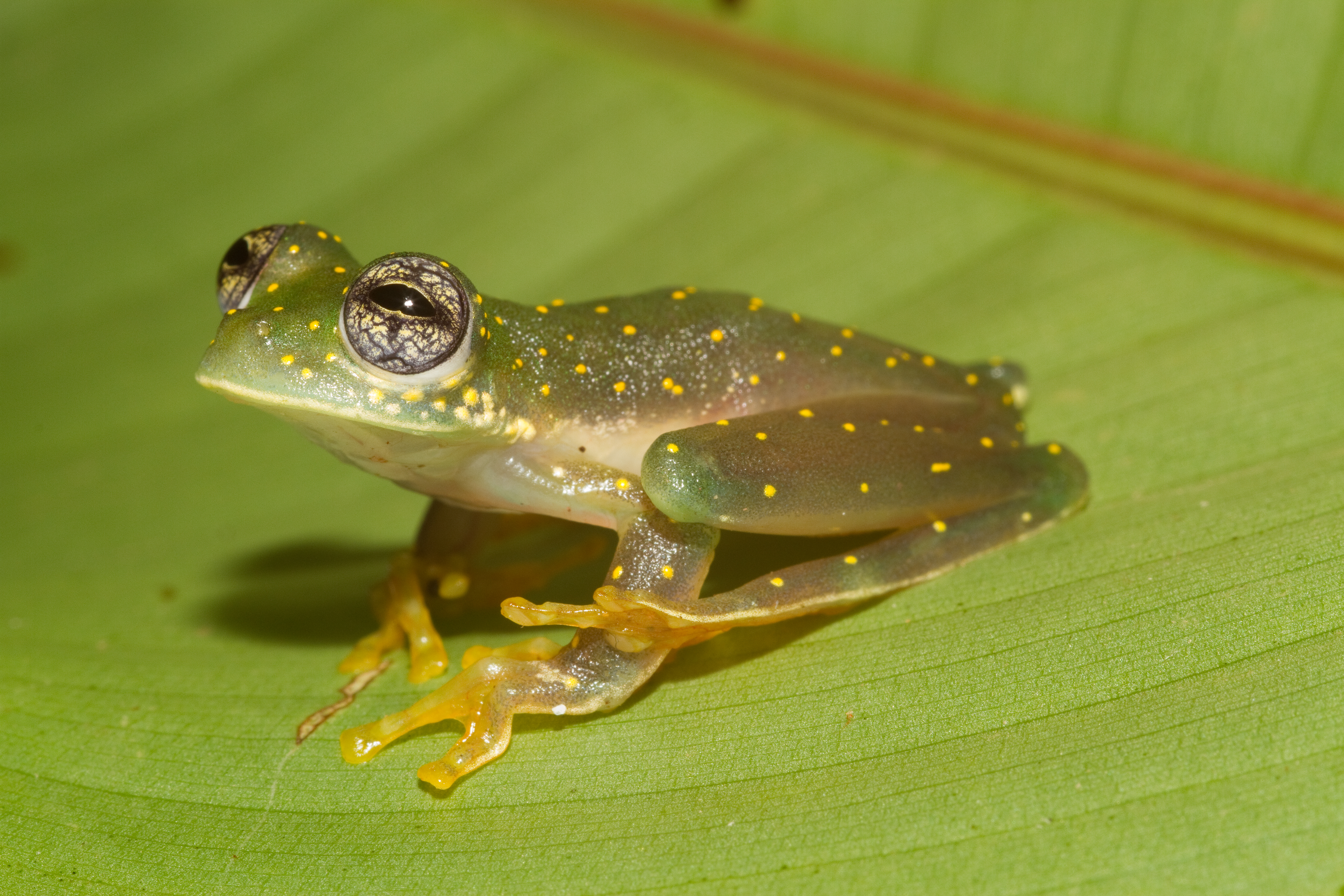 Cochranella albomaculata in Panama.